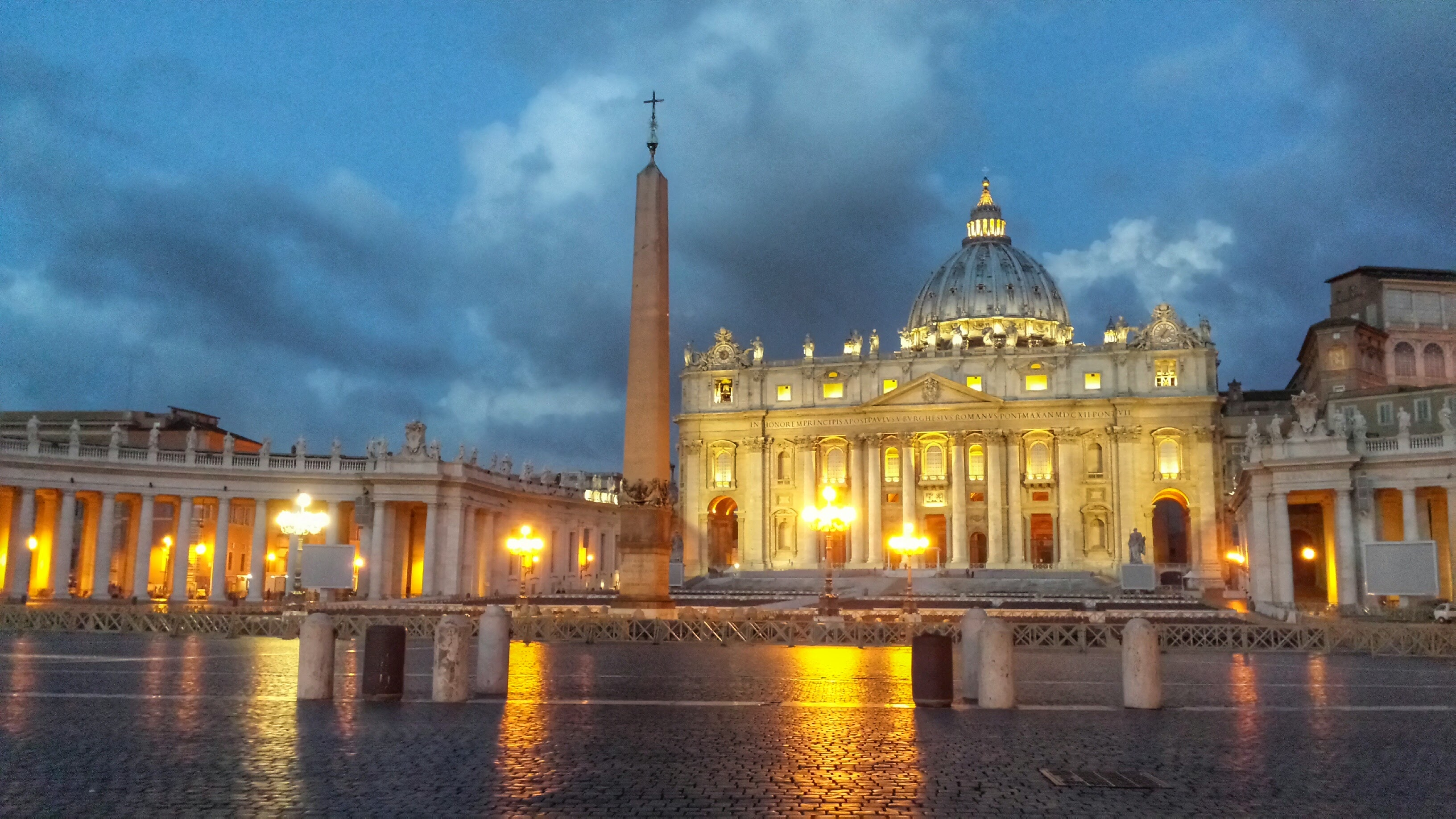 Petersdom im Vatikanstaat fotografiert am 7. Oktober 2015 gegen 6 Uhr morgens